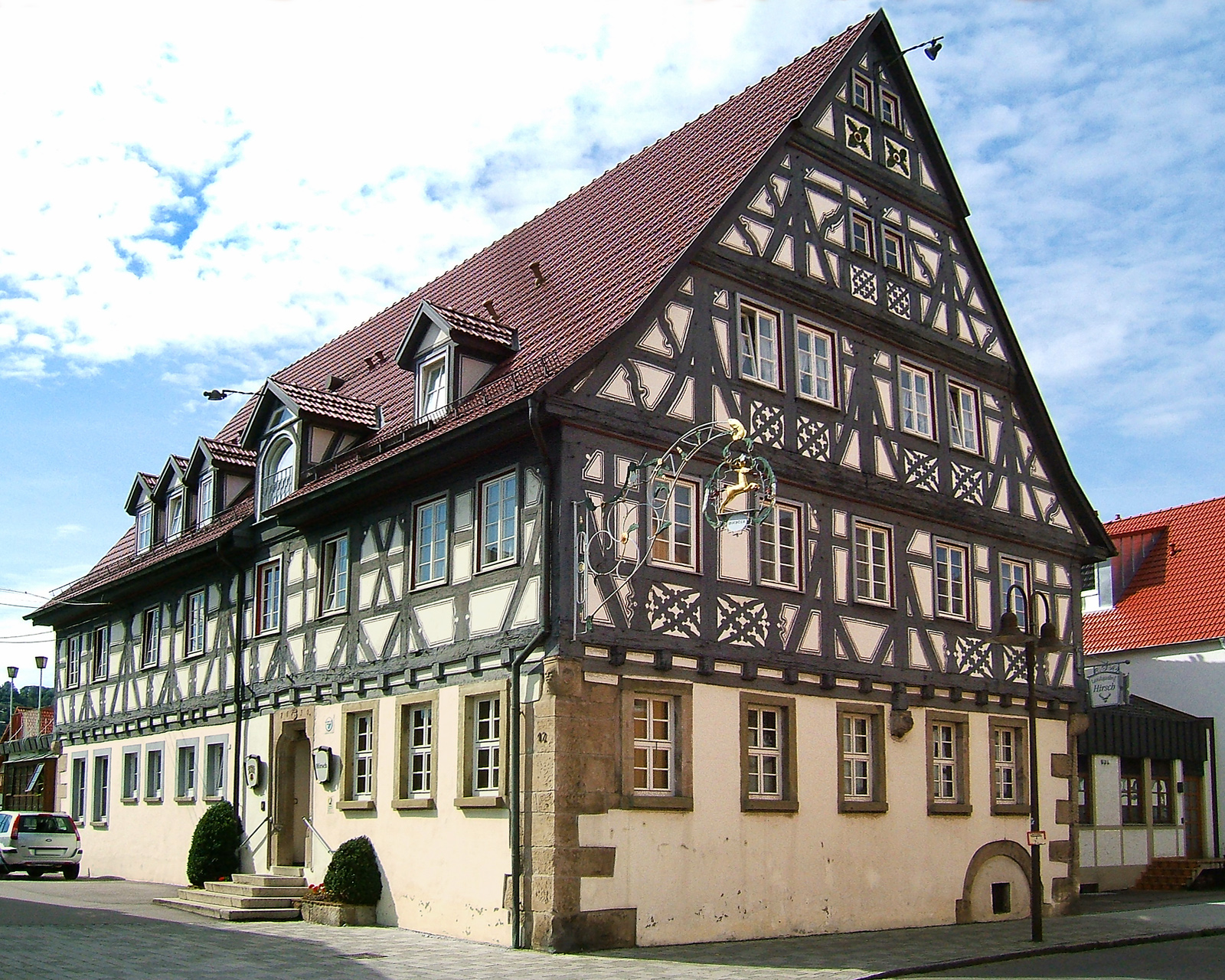 Fachwerkhaus Gasthof „Hirsch“ im Ortsteil Grunbach von Remshalden